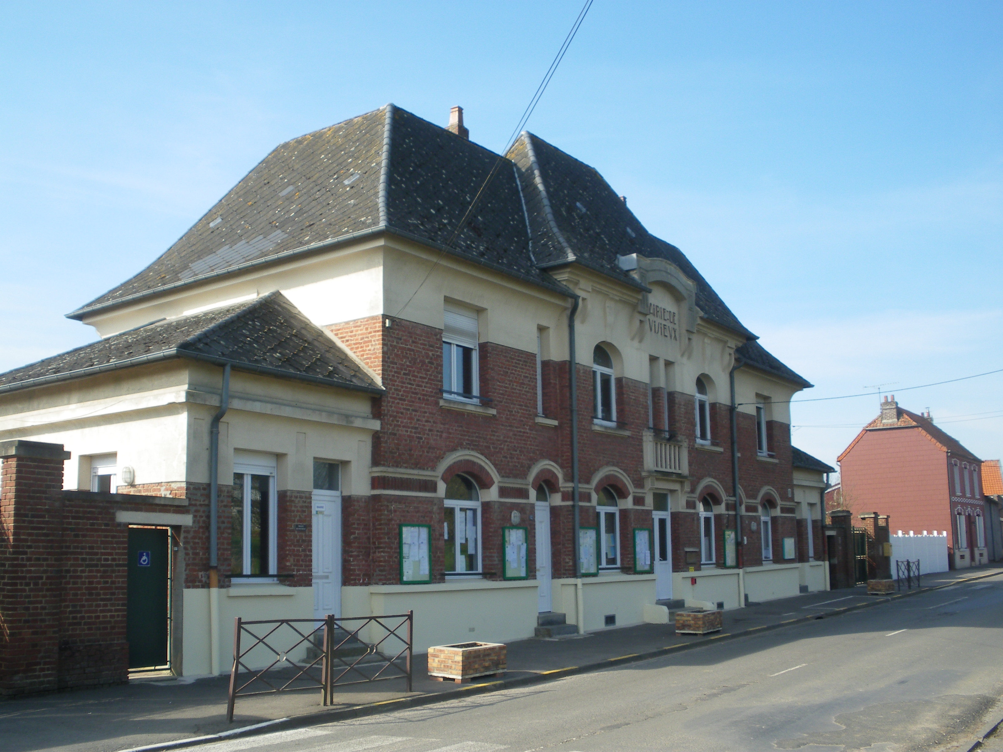 Vue de la mairie de Puisieux.